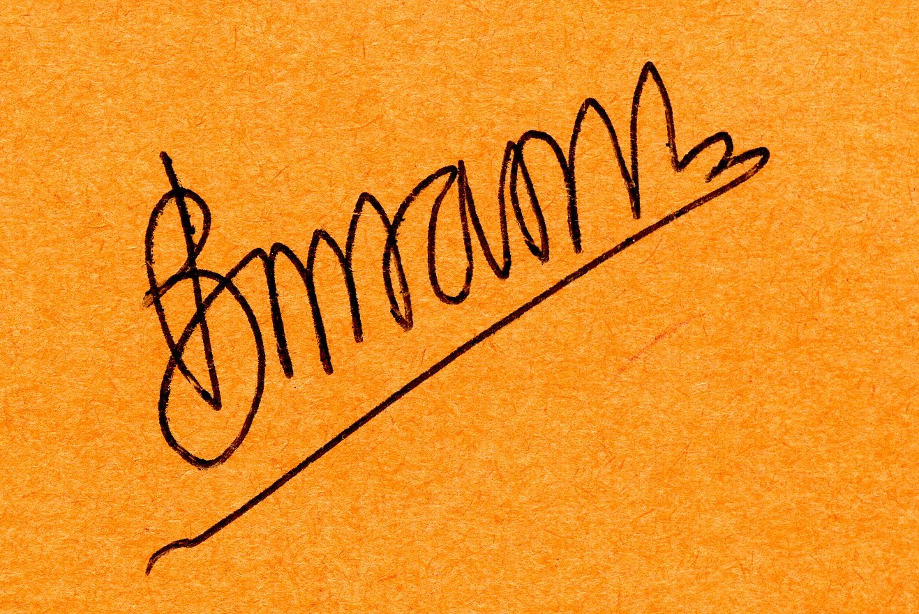 Signature de l'écrivain algérien Messaour Boulanouar